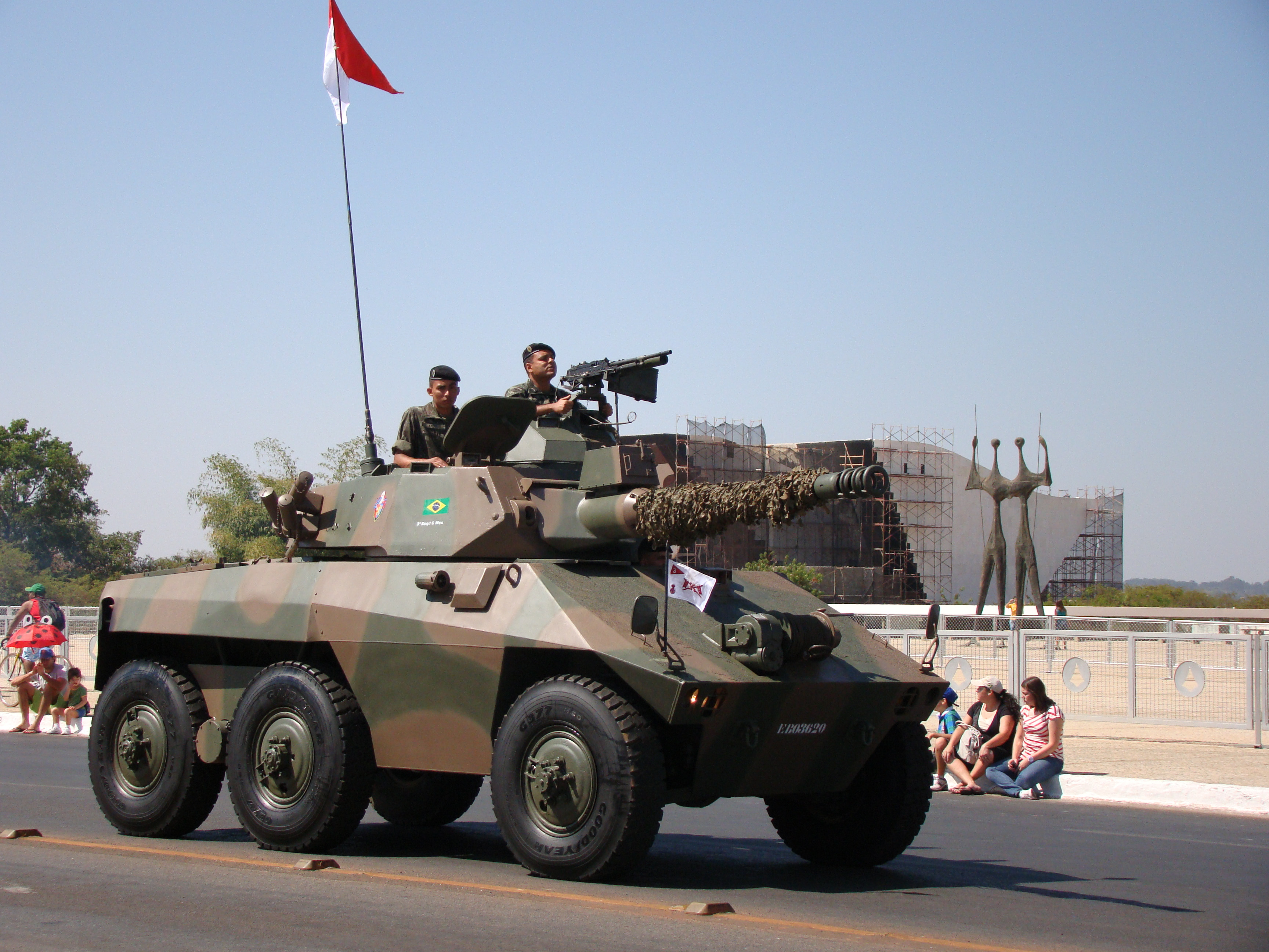 Exército Brasileiro